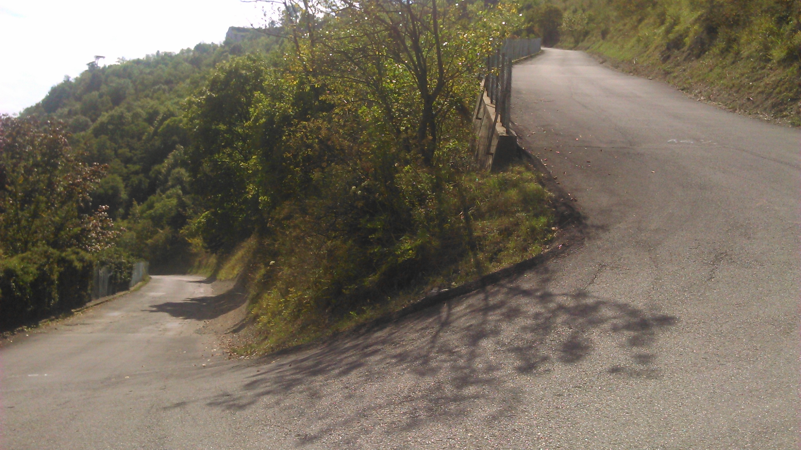 Epingle de la route menant au fort de la Bastille de Grenoble.